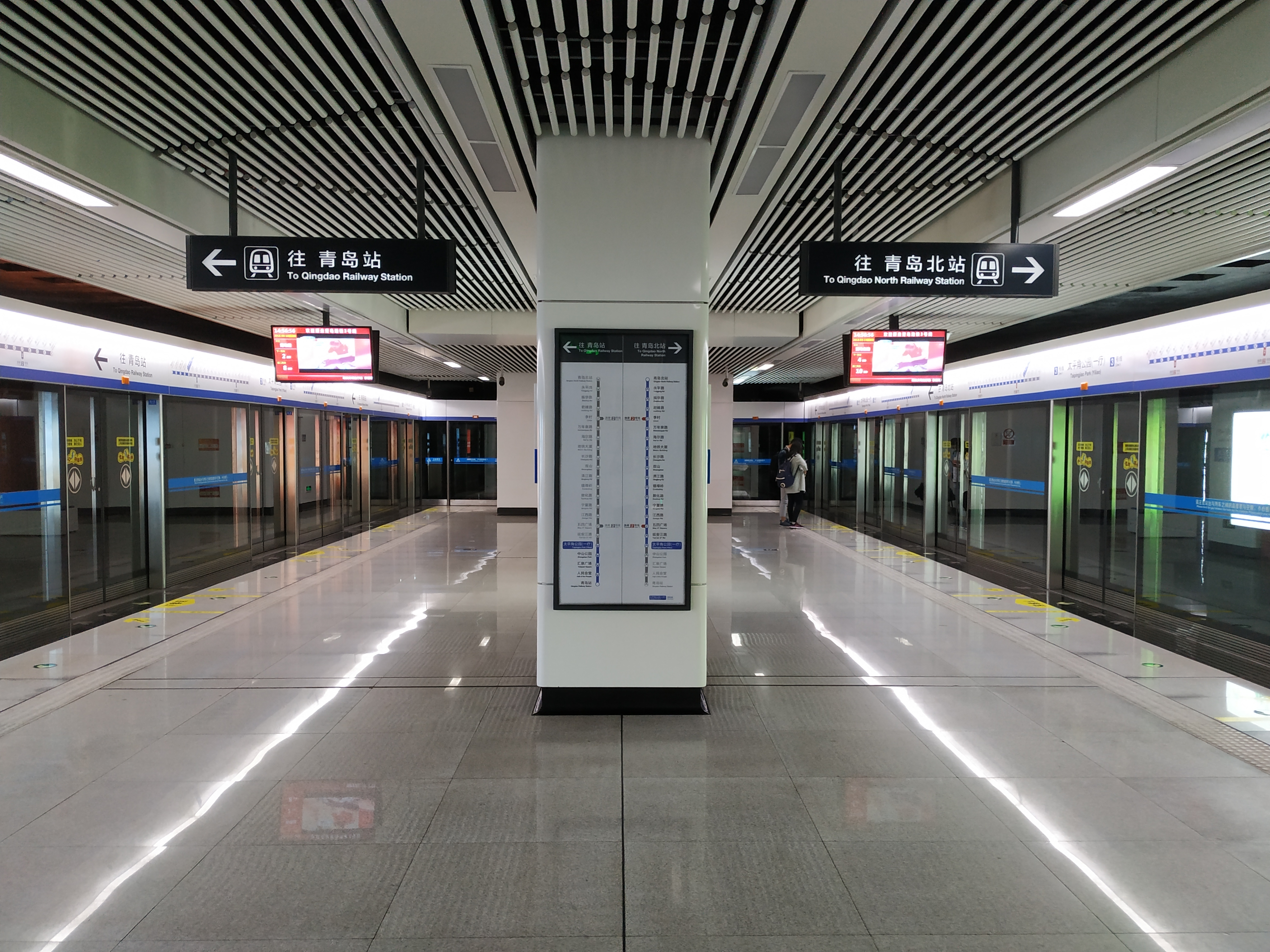 Taipingjyao Gongyuen Jhan jhanting